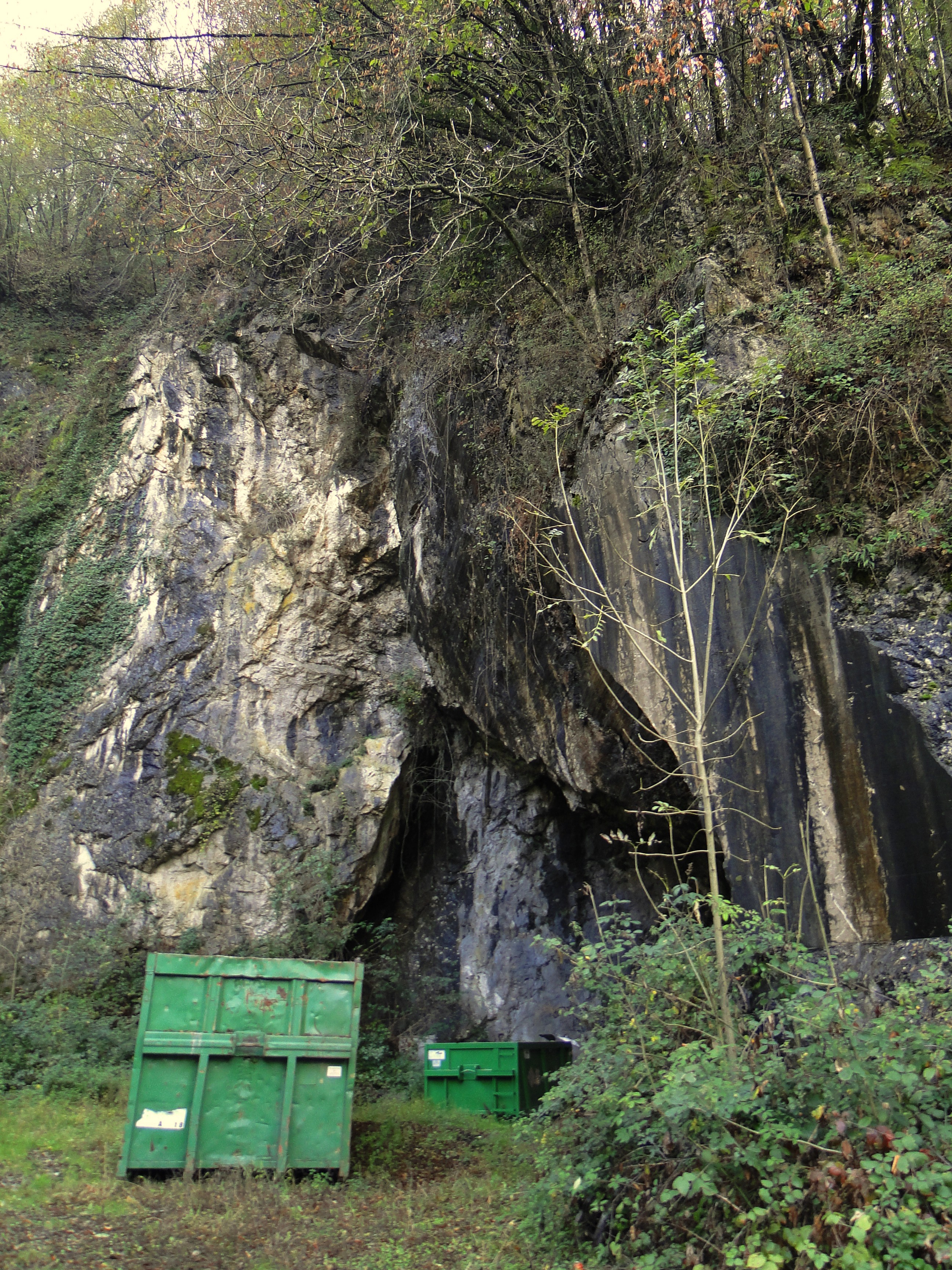 Abbazia, fraz. di Albino (BG). Cave di marmo